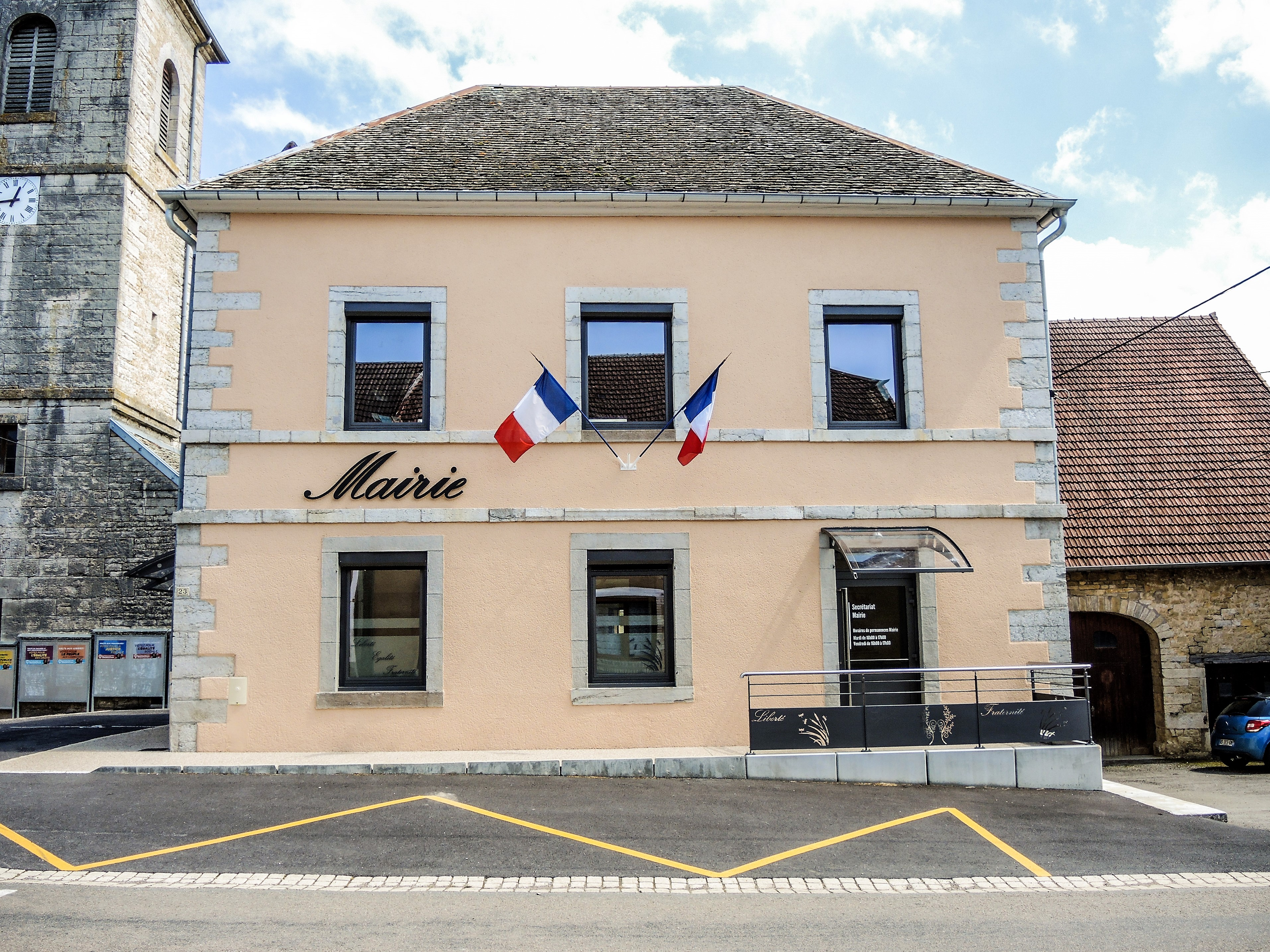 Mairie